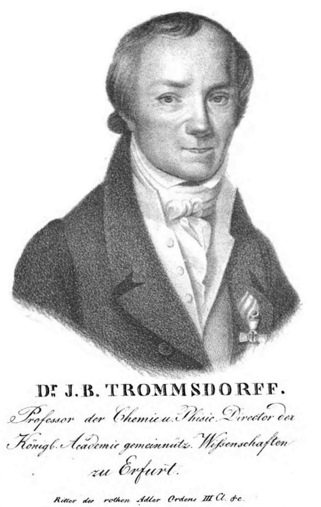 Apotheker und Pharmazeut Johann Bartholomäus Trommsdorff (* 8. Mai 1770 in Erfurt; † 8. März 1837 ebenda) Prof. der Chemie (1795, Erfurt)